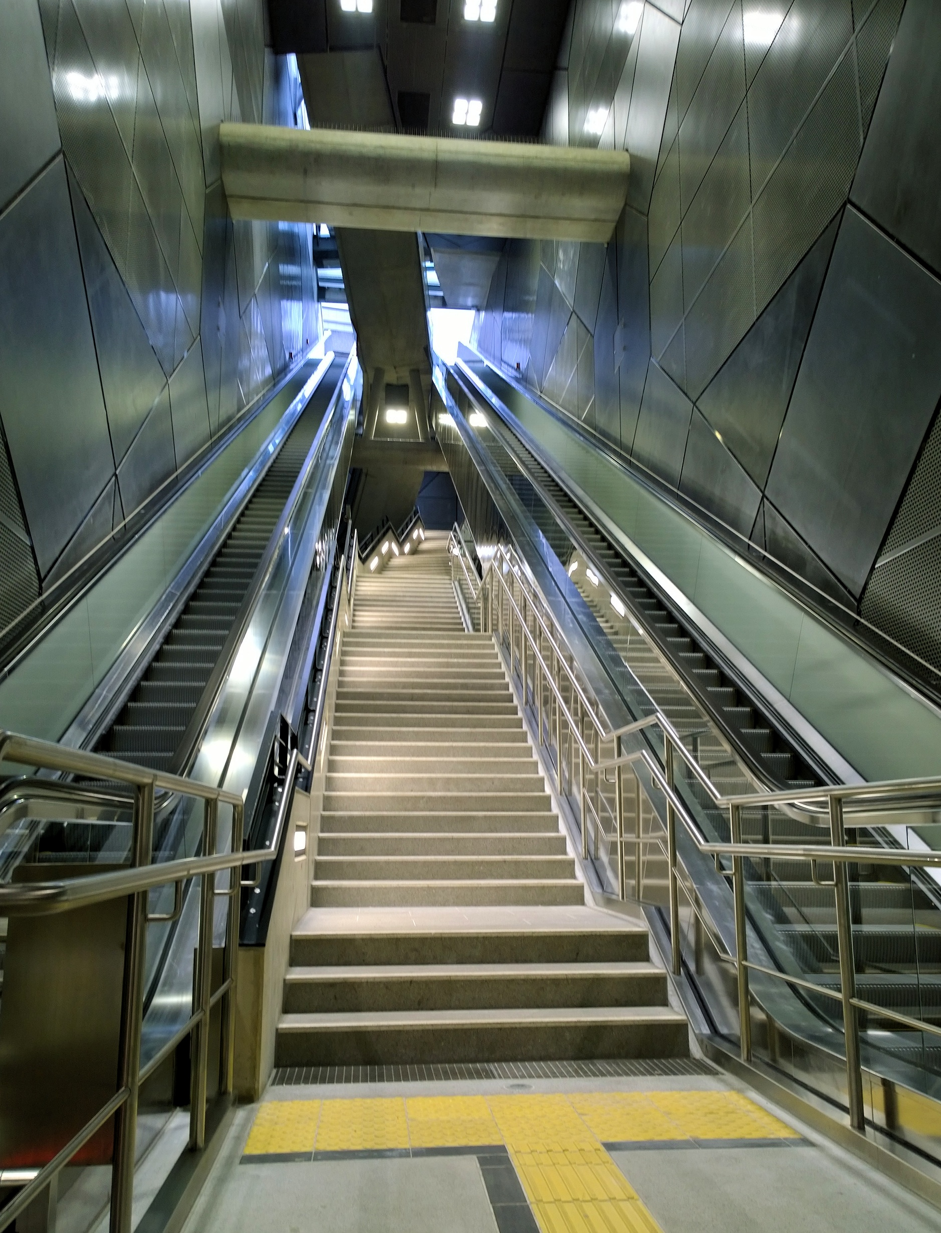 Die Rolltreppen im U-Bahnhof Severinstraße der Nord-Süd-Stadtbahn in Köln.